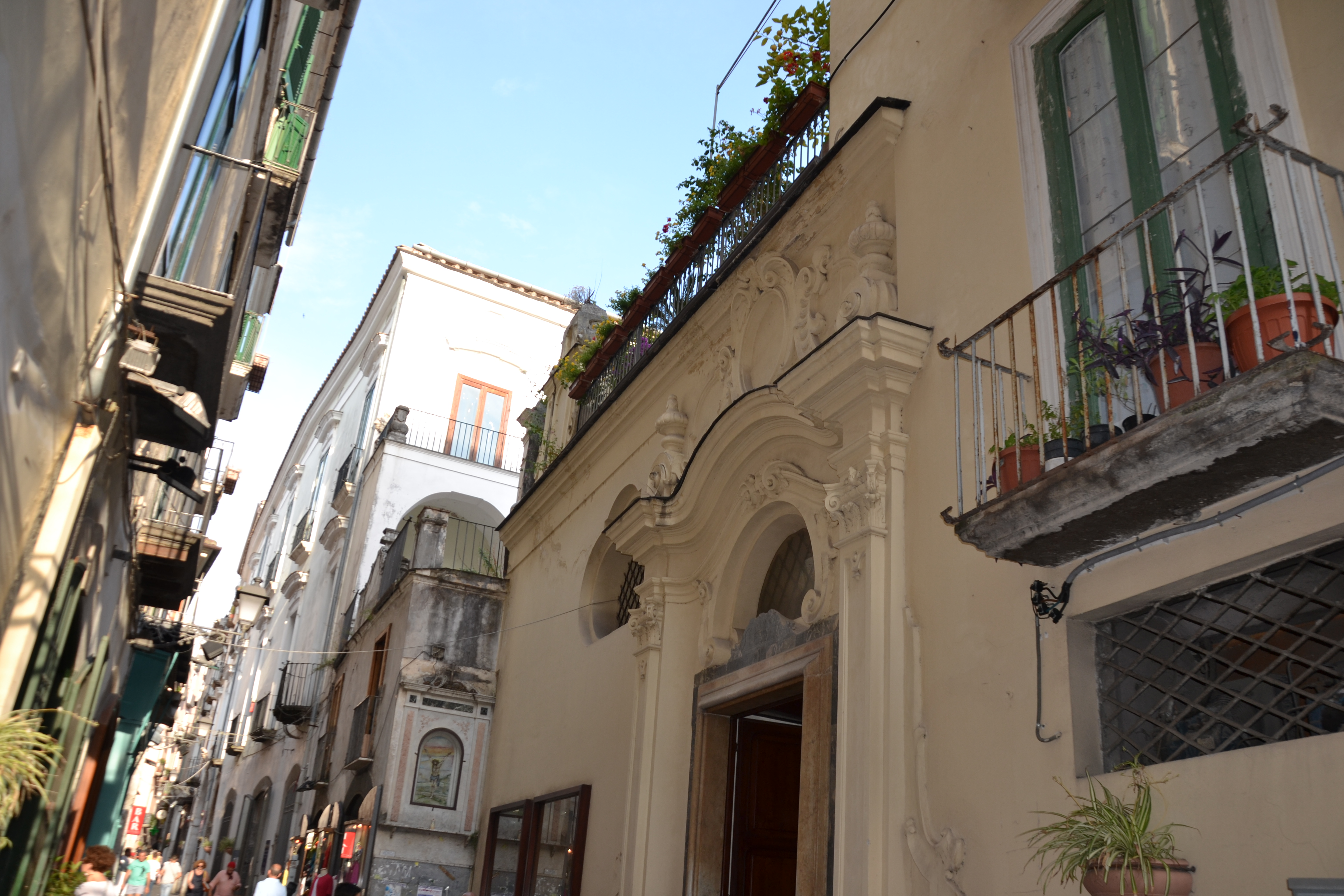 Chiesa di Sant'Antoniello a Salerno